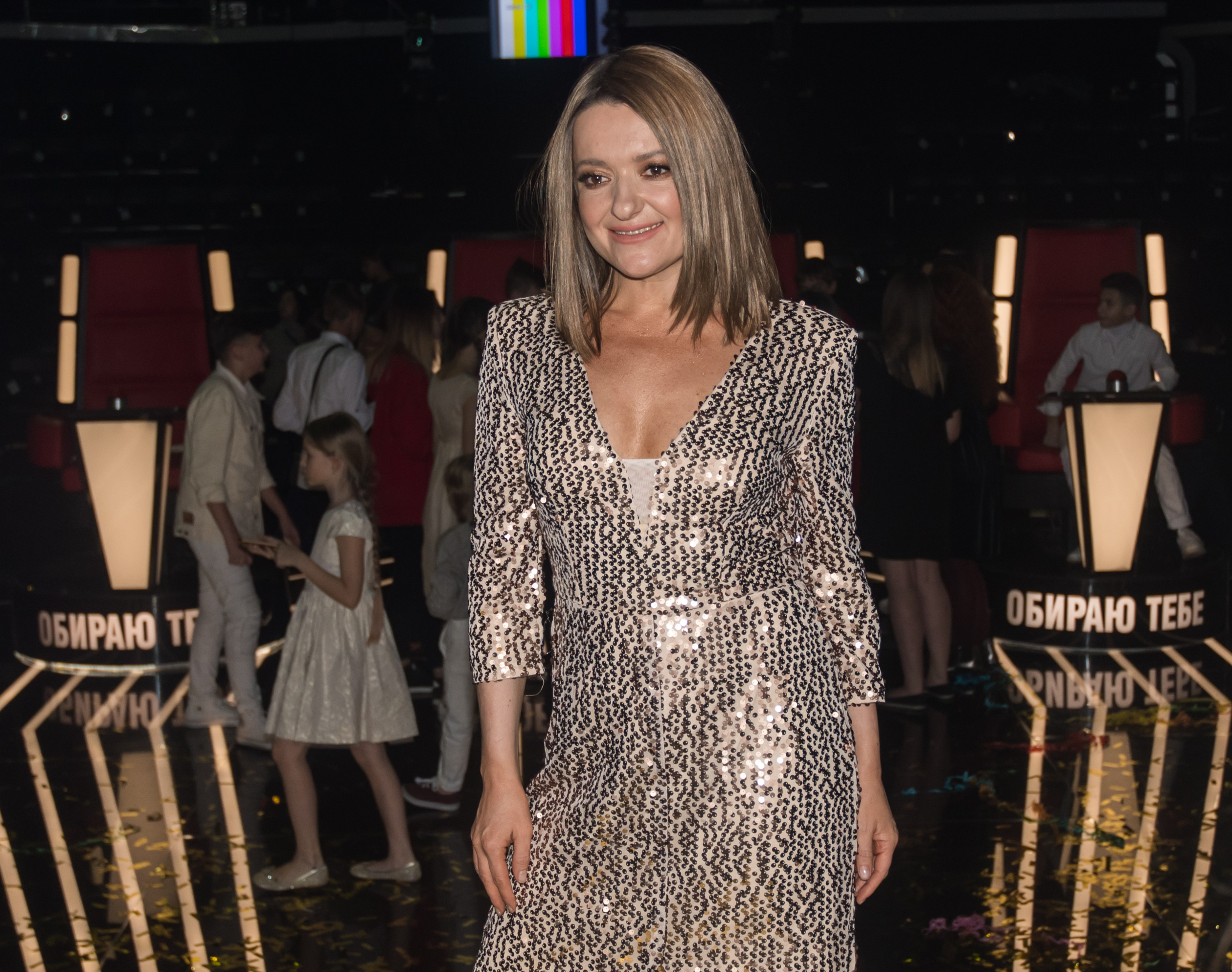 Финал Голос. Дiти 4. Наталья Могилевская